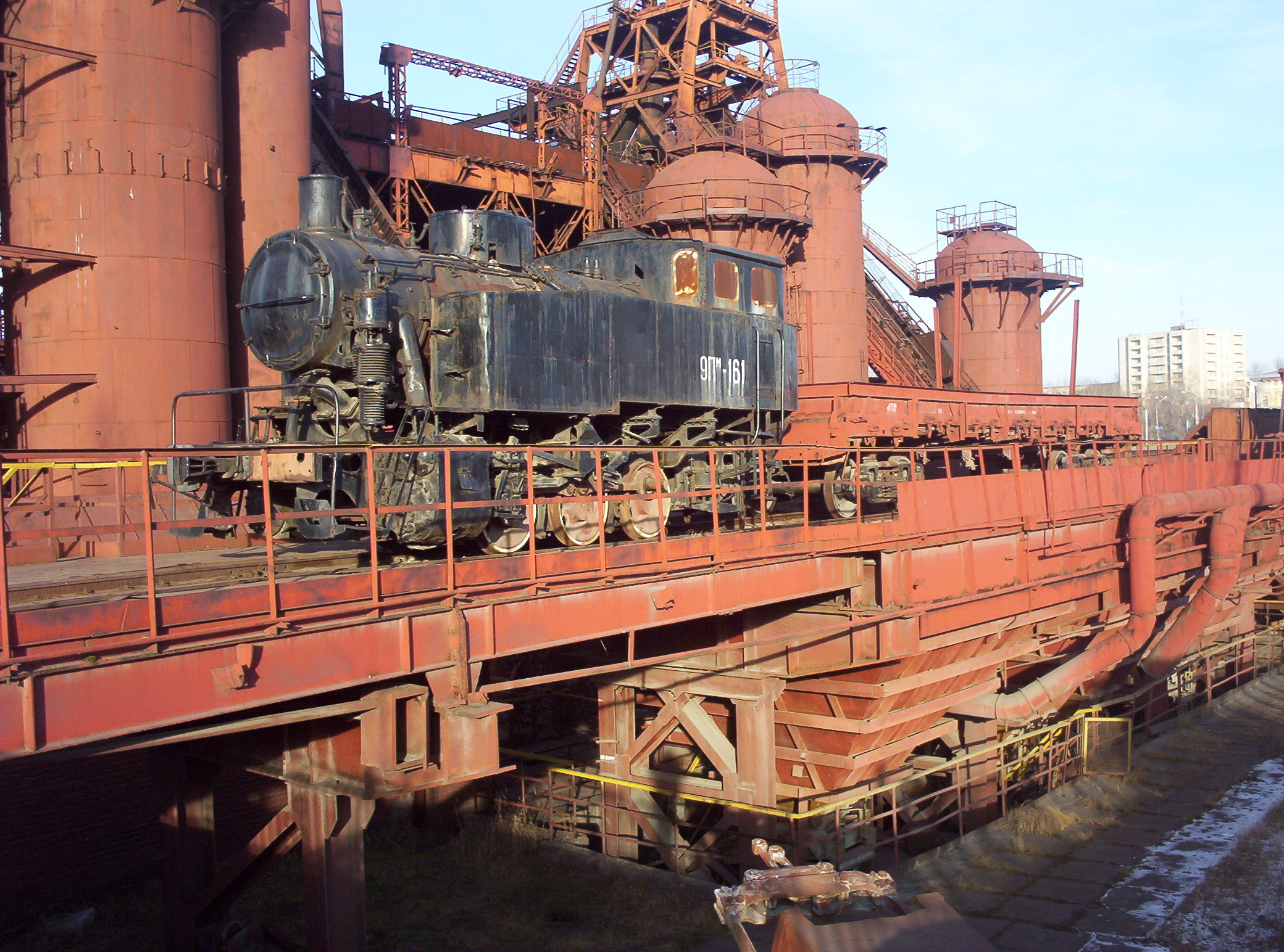 Паровоз-памятник 9Пм-161 Муромского паровозостроительного завода. Фотография сделана в 2005 году на заводе-музее г.Нижний Тагил, цифровой фотокамерой Kodak EasyShare CX4300 с разрешением 3.2 Мпкс. Автор снимка Воловик Виталий Владимирович.